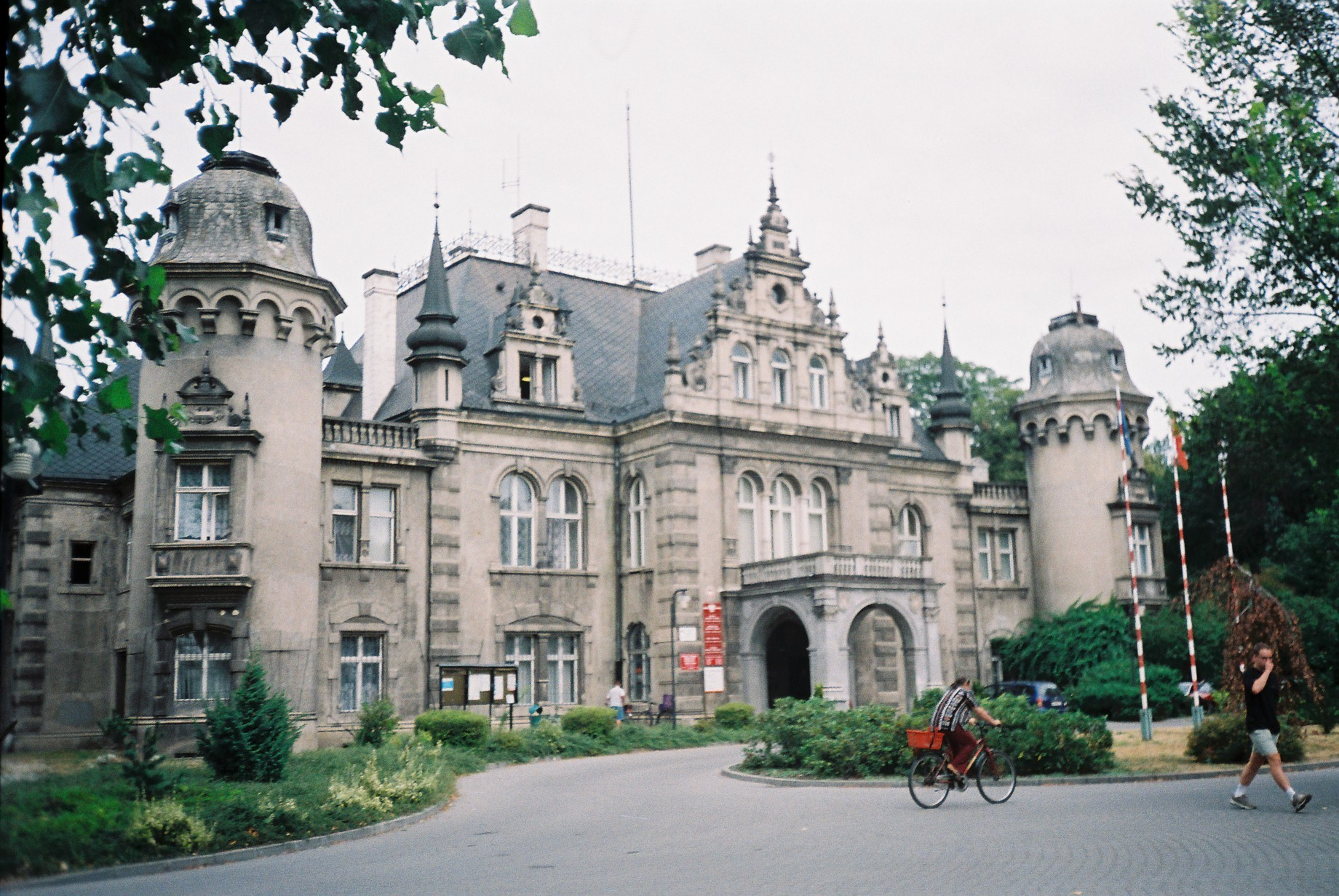 Jelcz-Laskowice - Pałac, obecnie Urząd Miasta (zabytek nr rejestr. A/3981/601/W)